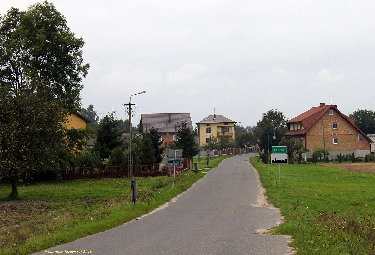 Lubice.